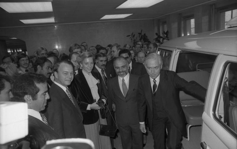 Staatsbesuch König Hussein II. und Königin Nur Al-Hussein in der Bundesrepublik Deutschland. Wolfsburg: Besichtigung des Volkswagenwerks